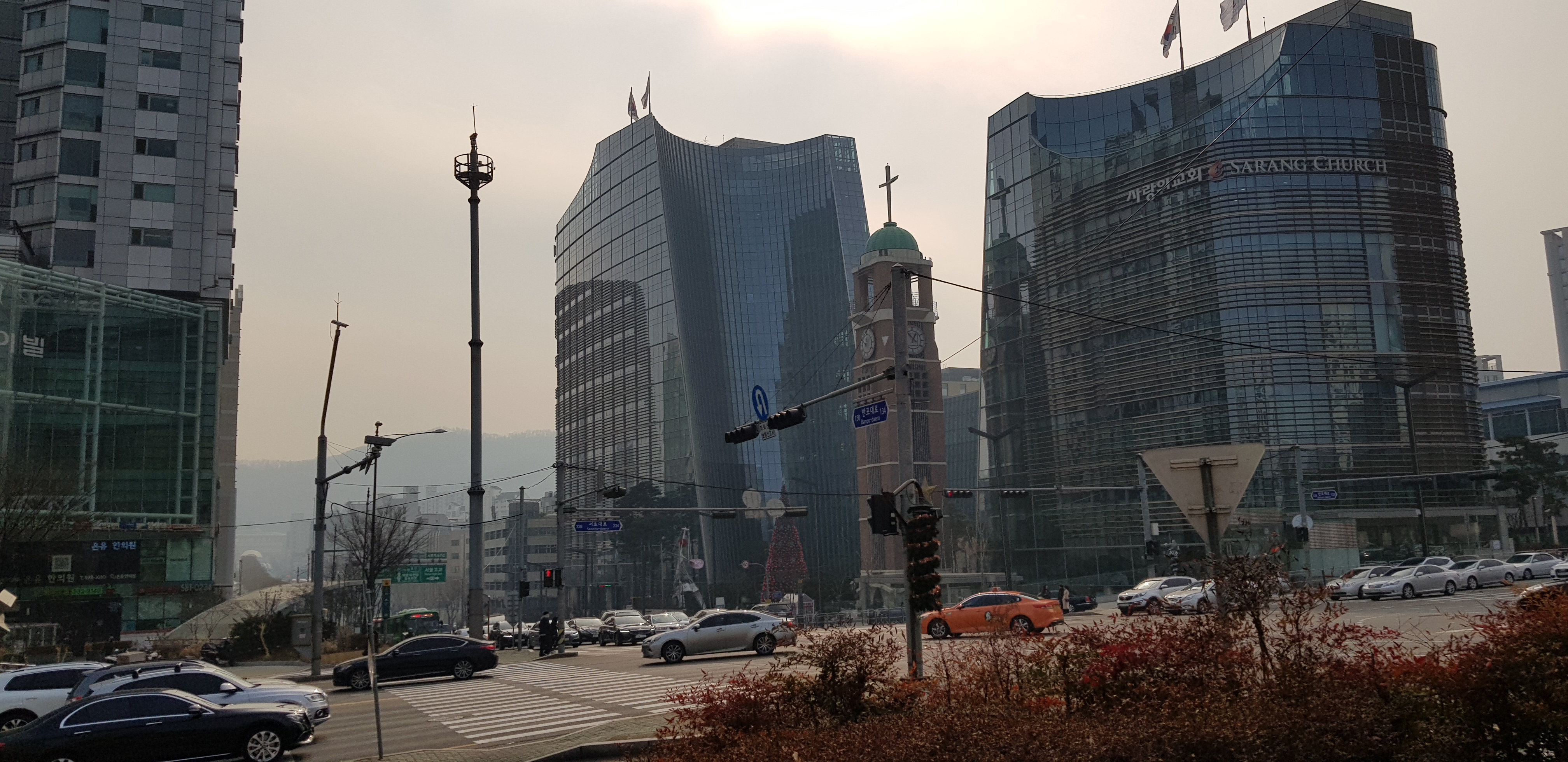 사랑의 교회